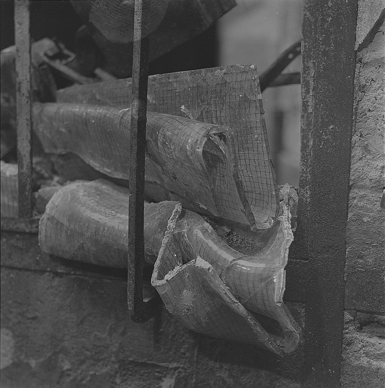 Original image description from the Deutsche FotothekTeil eines Stahlfensterrahmens mit Sicherheitsgitter und geschmolzenen Glasscheiben